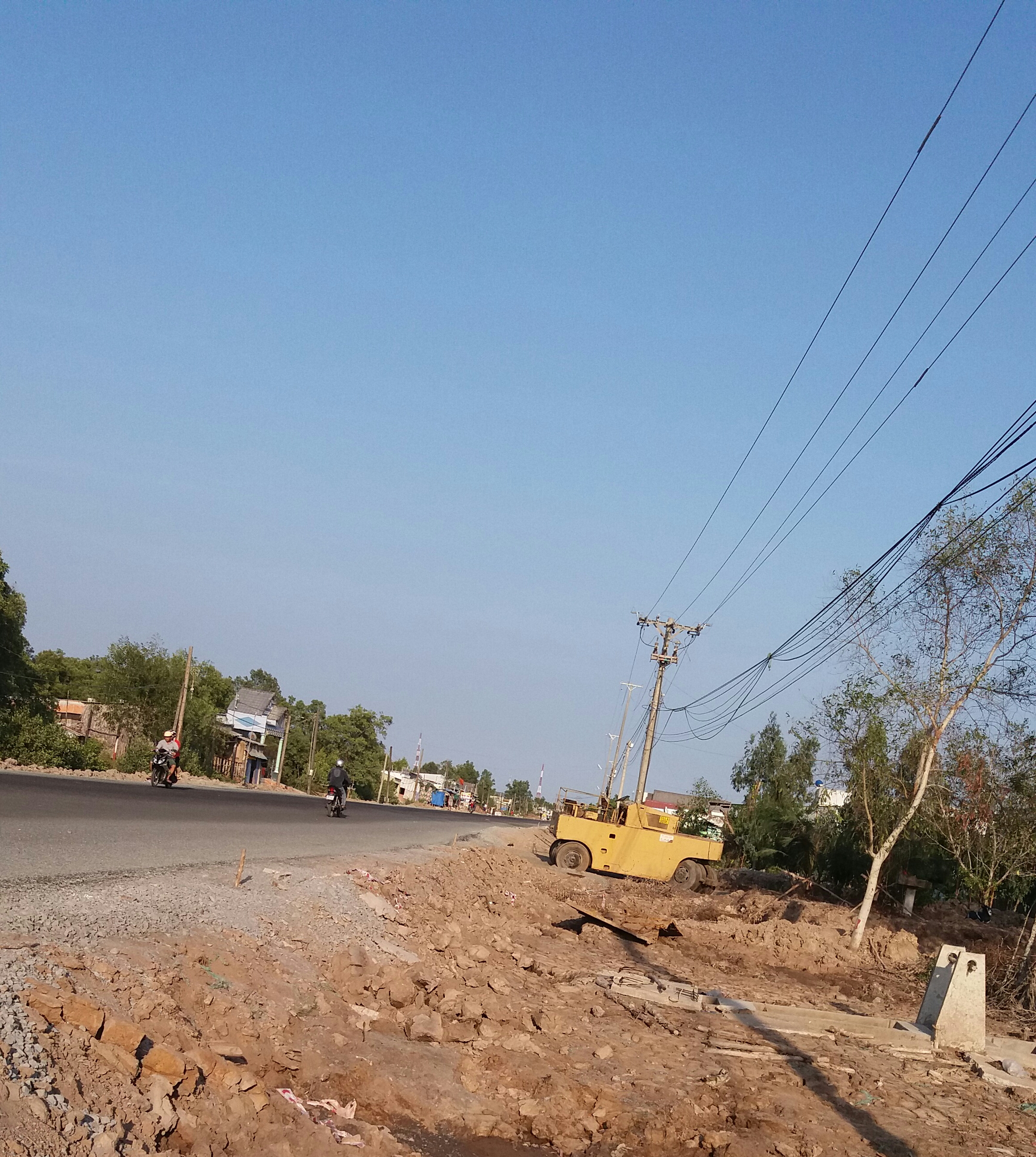 Một góc của con đường bộ ở Năm Căn, Việt Nam